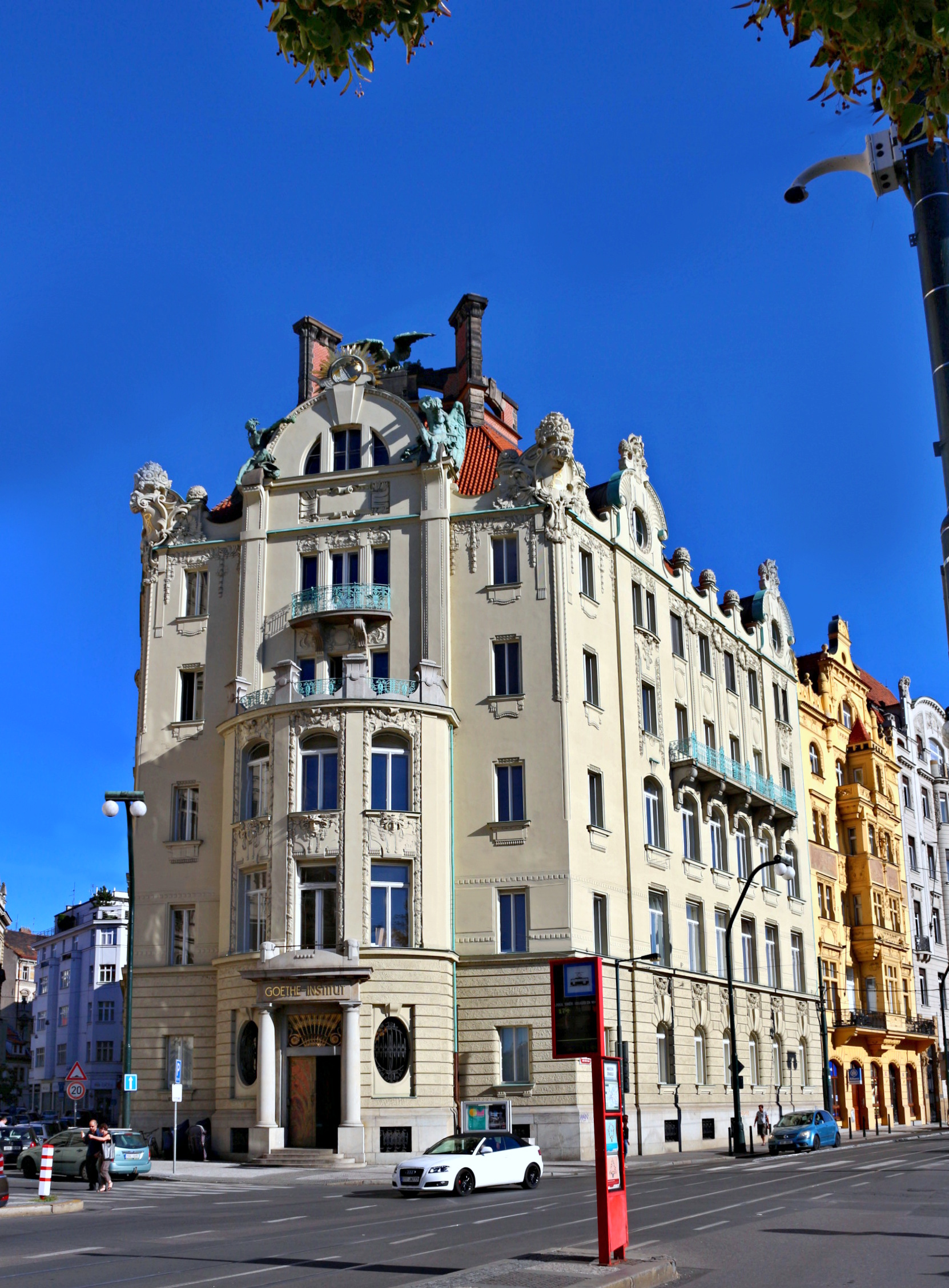 Goethe-Institut, Praha